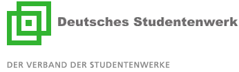 Logo des Deutschen Studentenwerks